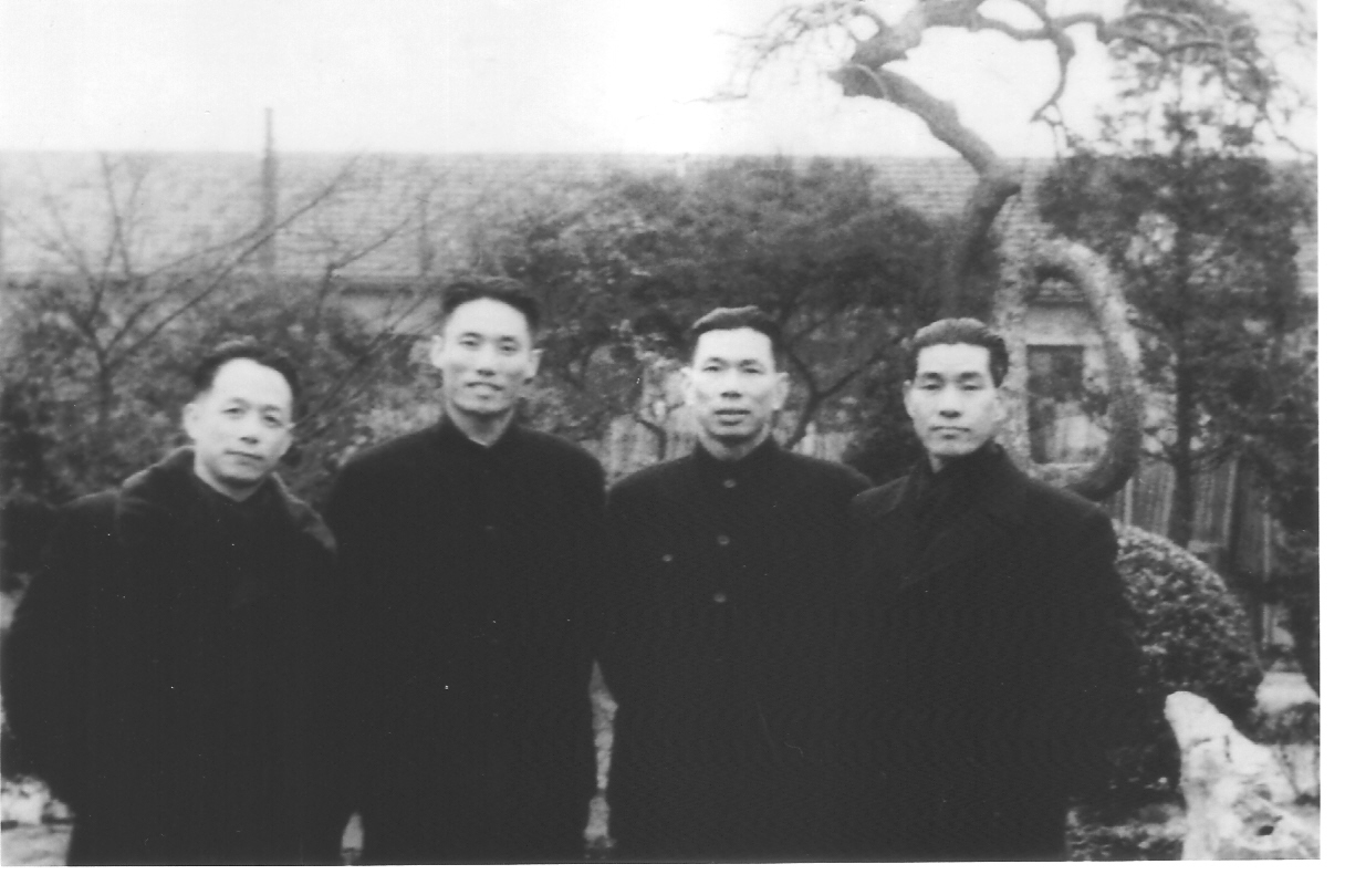 谷牧、李耀文、王一平和曹漫之四人于1954年合影